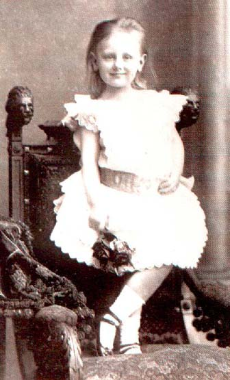 Geen info bij upload door uploader; later aangevuld door BenTels: Portret van Prinses Wilhelmina, kennelijk uit 1885. Auteursrecht was vanaf 1866 50 jaar na dood auteur. Auteursrecht zou gelden als schilder overleden in of na (2005 - 50 =) 1955, dus op zijn minst 70 jaar na schilderen portret (en waarschijnlijk veel langer). Niet verlopen zijn van auteursrecht op dit portret is zeer onwaarschijnlijk. Ergo: PD